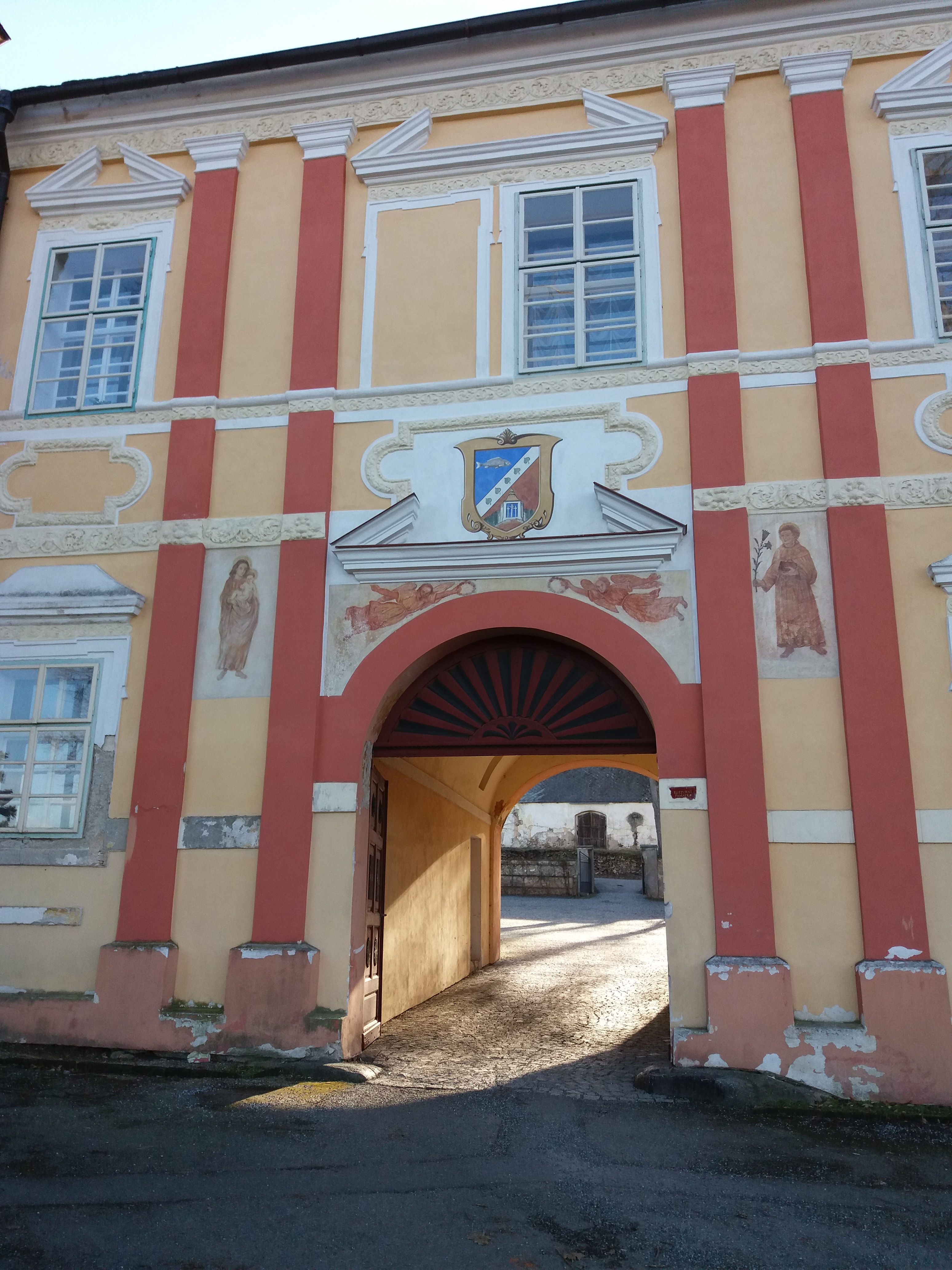 Pohled na zámek z jižní strany. Bránou se do zámku vchází.